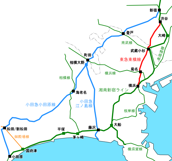 湘南新宿ラインと競合する私鉄各路線の経路図